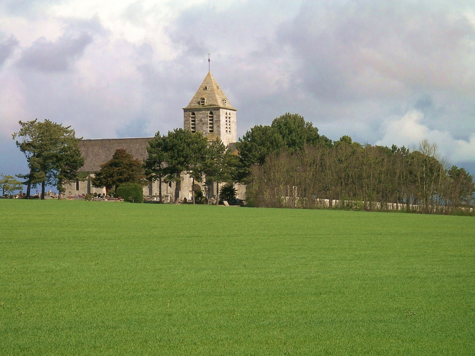 Eglise St Hilaire à Cairon (Calvados)